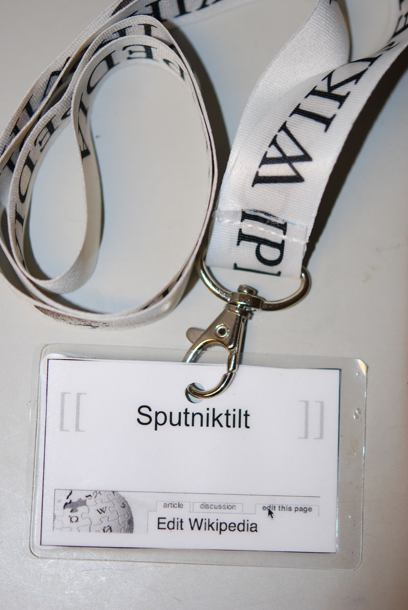 Bändel Wikipedia (Sputniktilt)